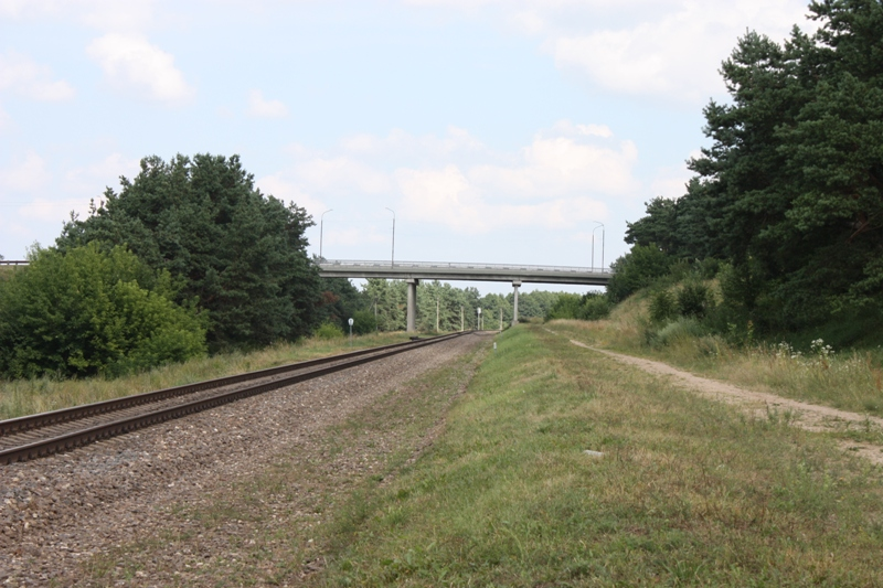 Krašto kelio Nr. 102 viadukas per geležinkelį Pabradėje